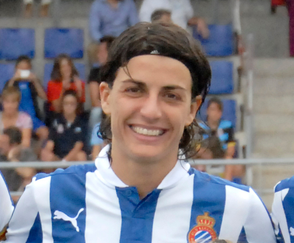 Sandra Vilanova